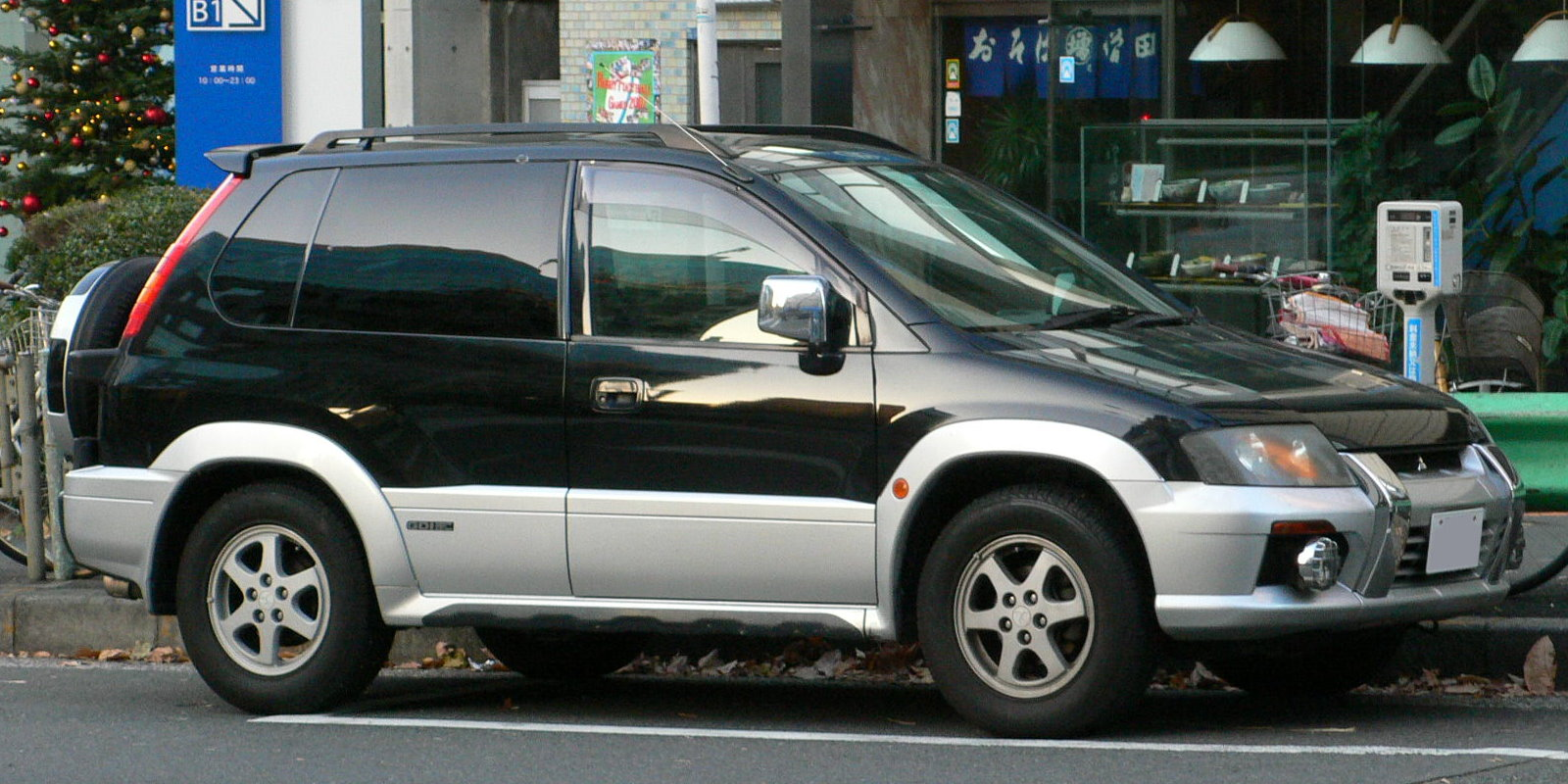 2nd generation Mitsubishi RVR (1997 - 1999)